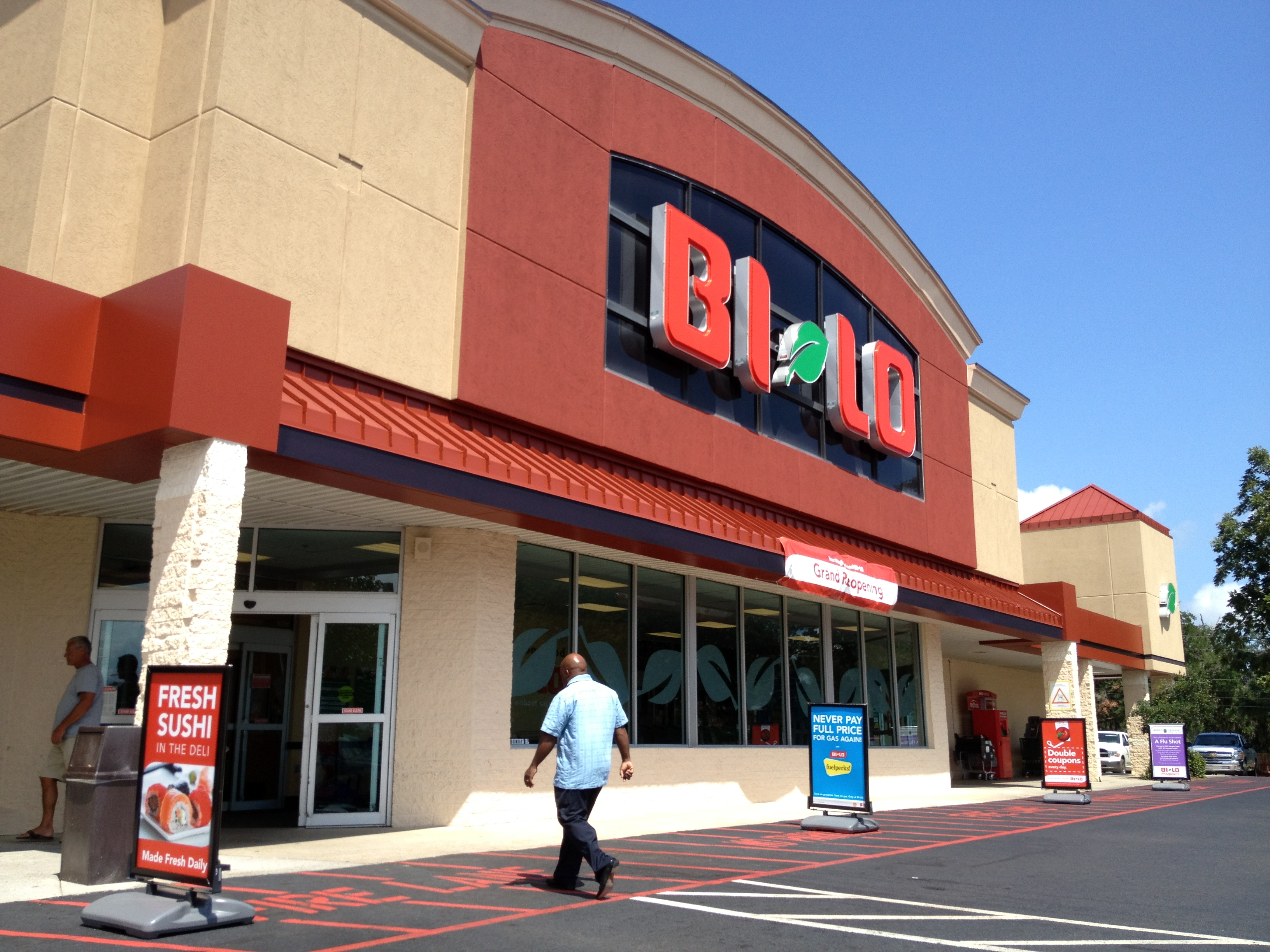 Bi-Lo Beaufort, SC